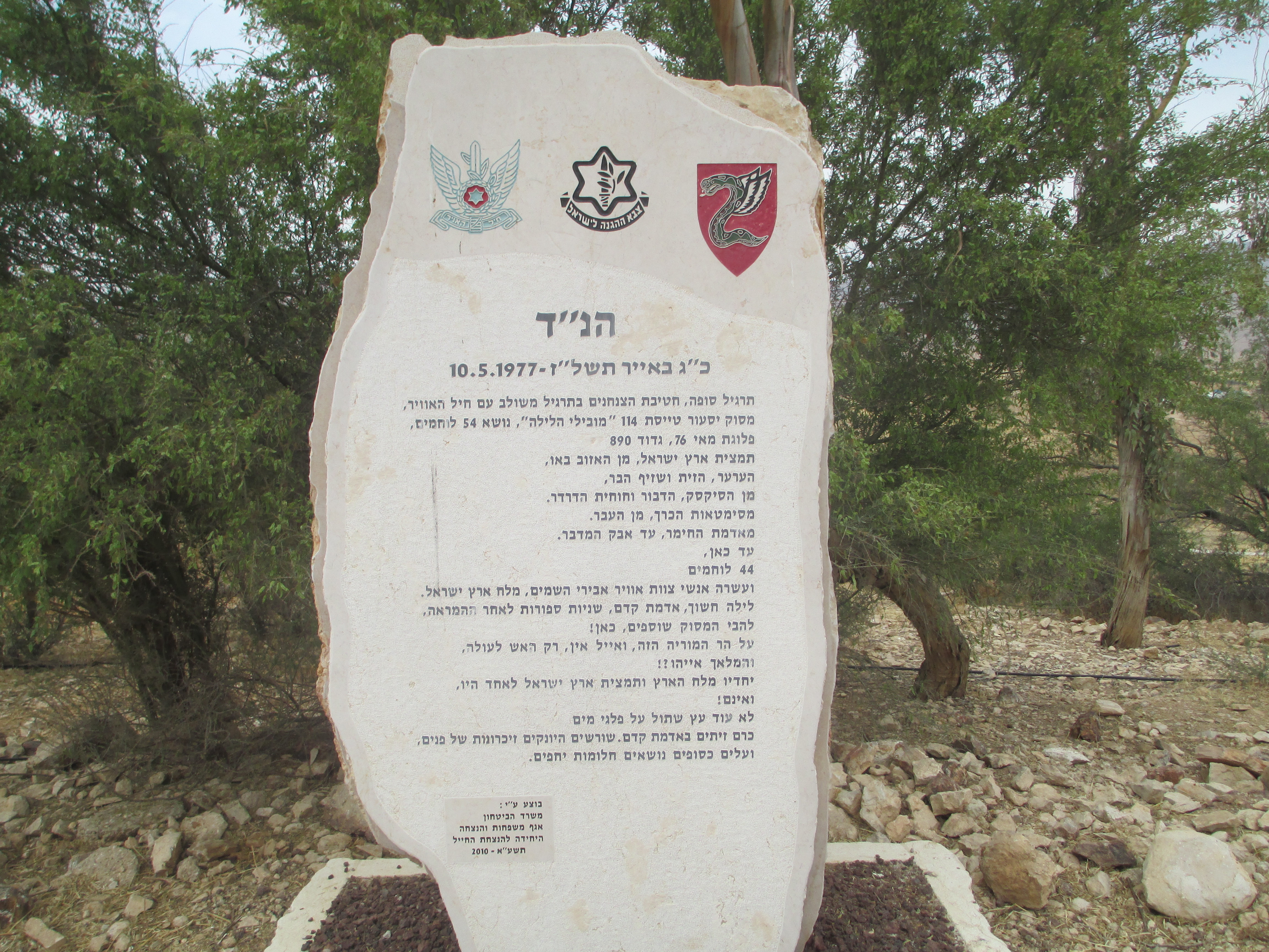 אתר הזיכרון לנ"ד